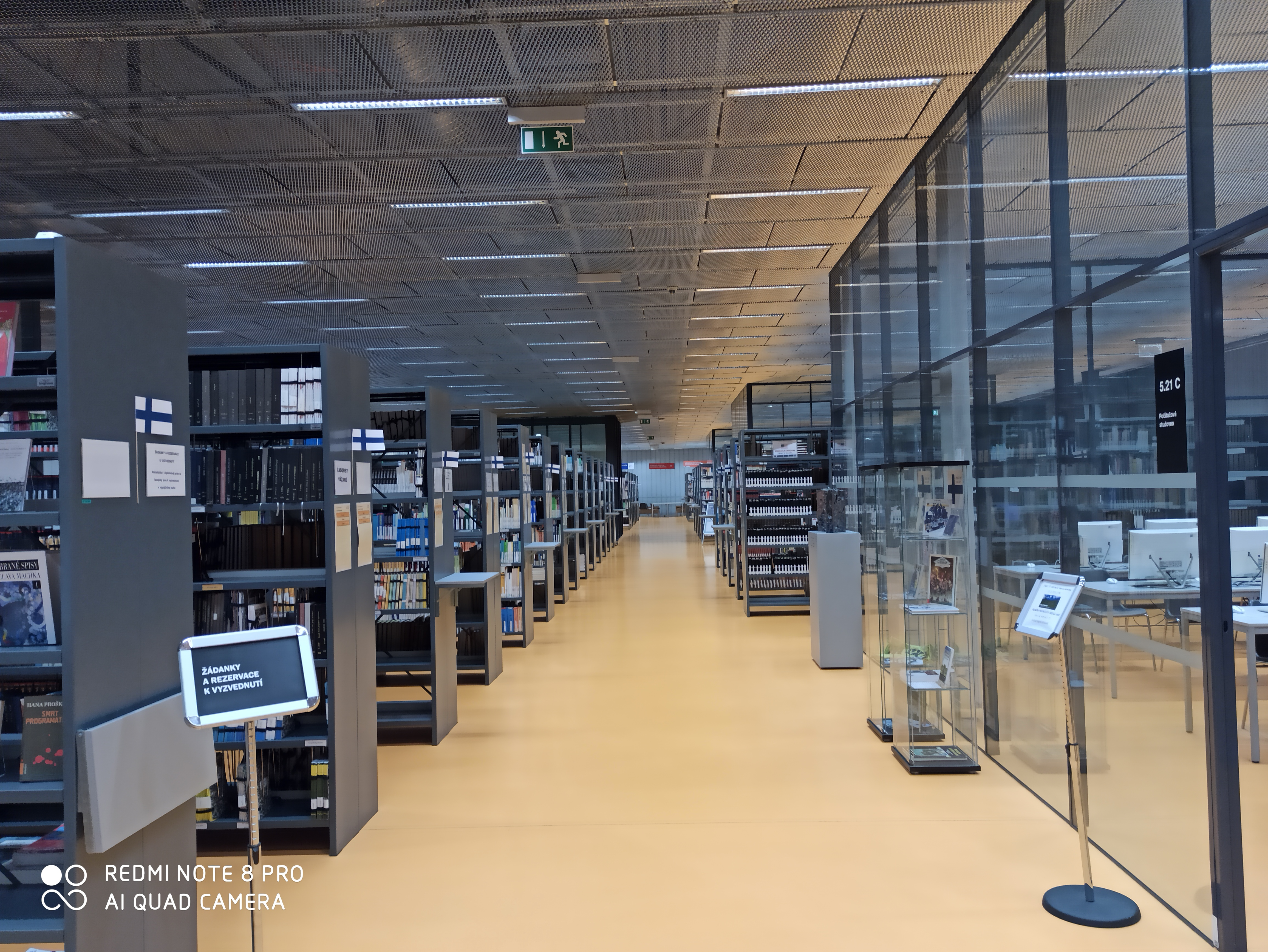 Vědecká knihovna UJEP - volný výběr (výpůjční oddělení)